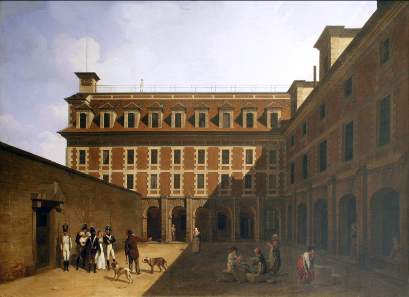 La Prison des Madelonnettes